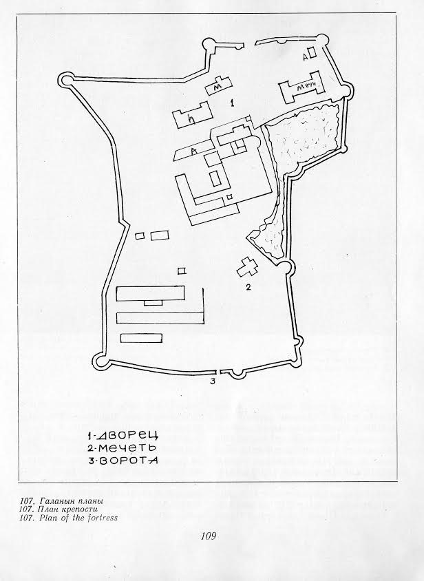 Nuxa qalasının 26 fevral 1853 cü ildə tərtib olunmuş planı.